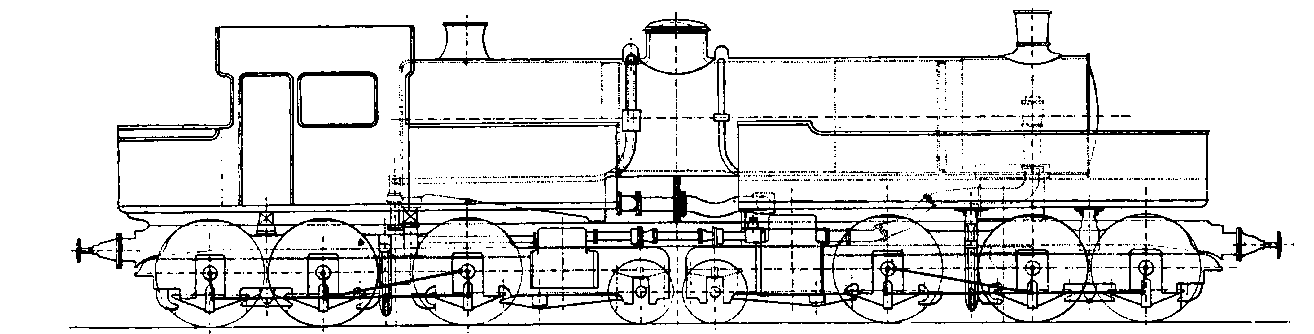 Line drawing of a du Bousquet locomotive